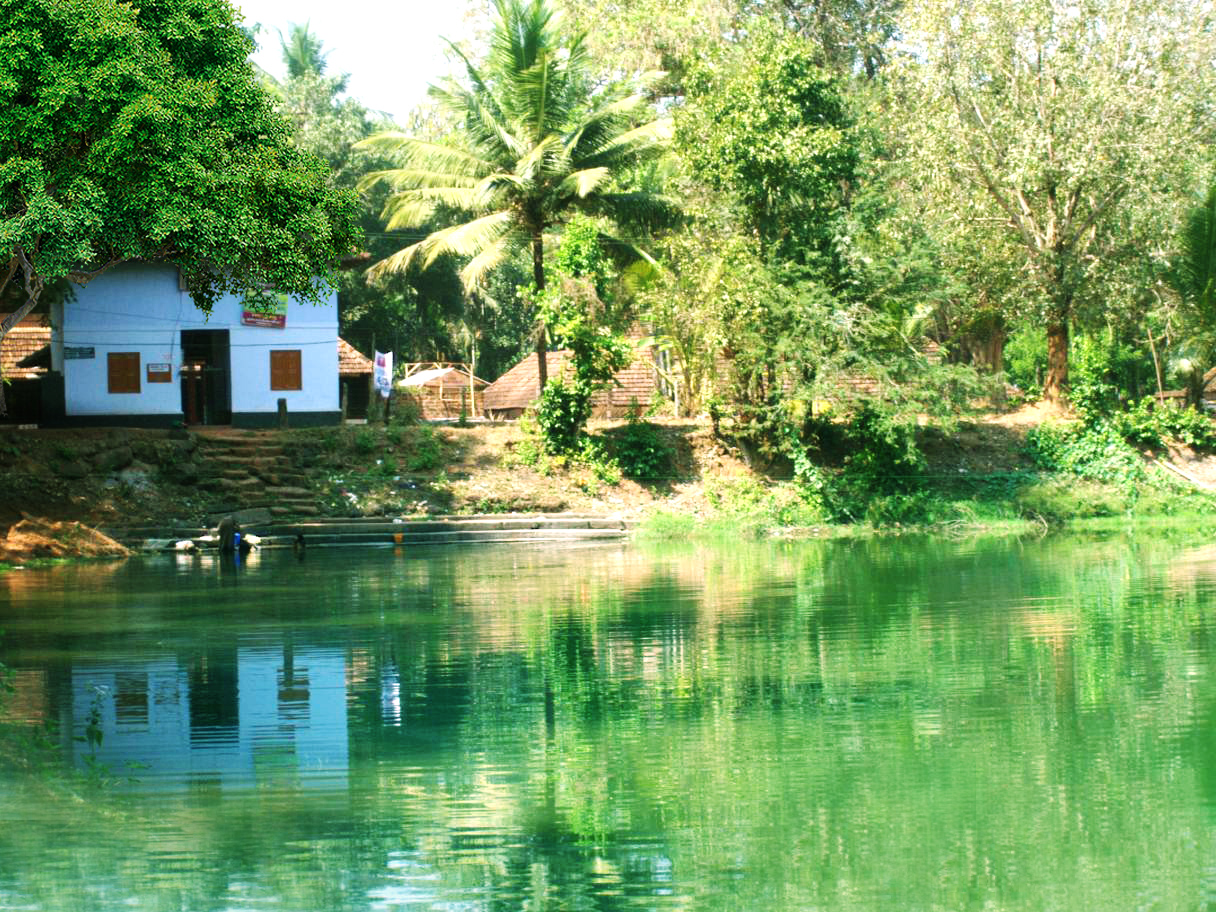 കുട്ടന്കുളം, തൃക്കലങ്ങോട് 32